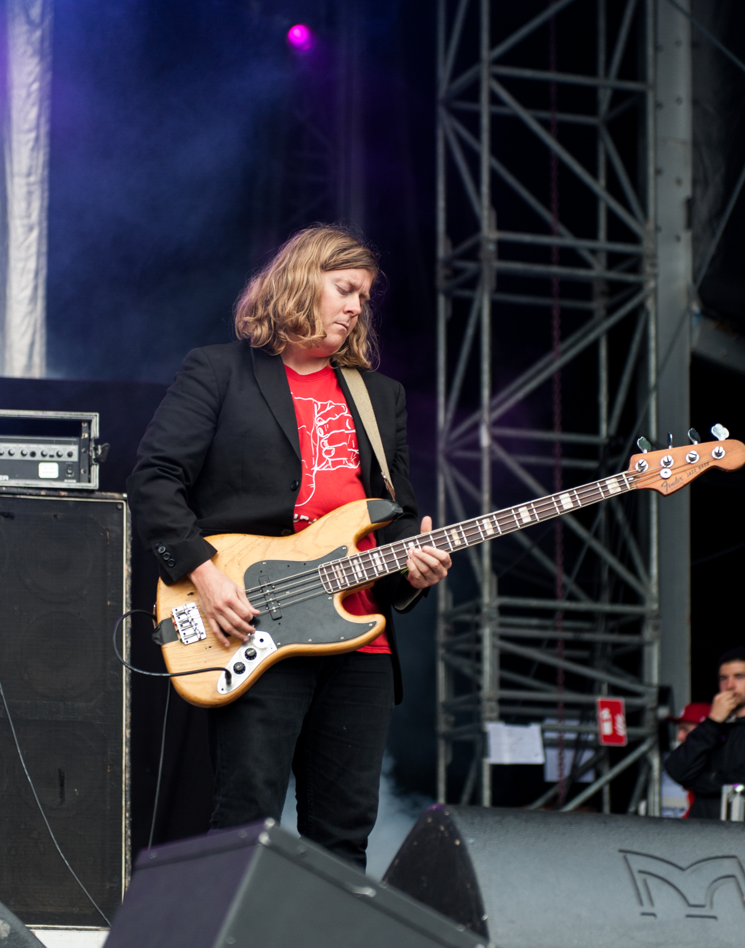 Die Band Future Islands auf dem Kosmonaut Festival 2015 in Chemnitz Oberrabenstein.